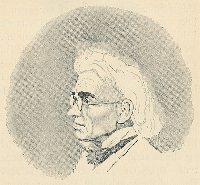 Historikeren og bibliotekaren Christian Molbech, efter tegning af J.V. Gertner.